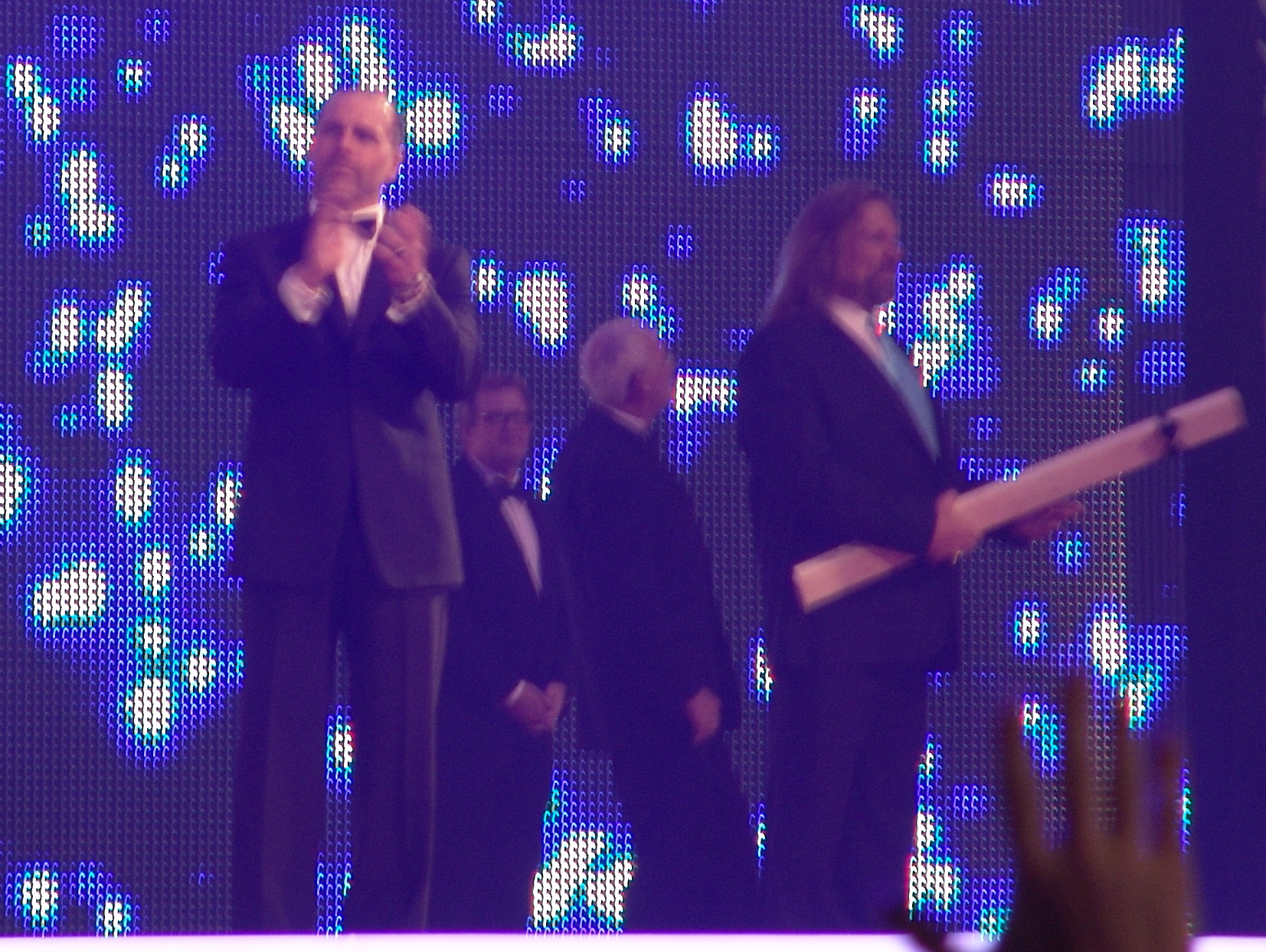 Los miembros del HOF 2011 Shawn Michaels, Jim Duggan, Drew Carey y Bob Armstron